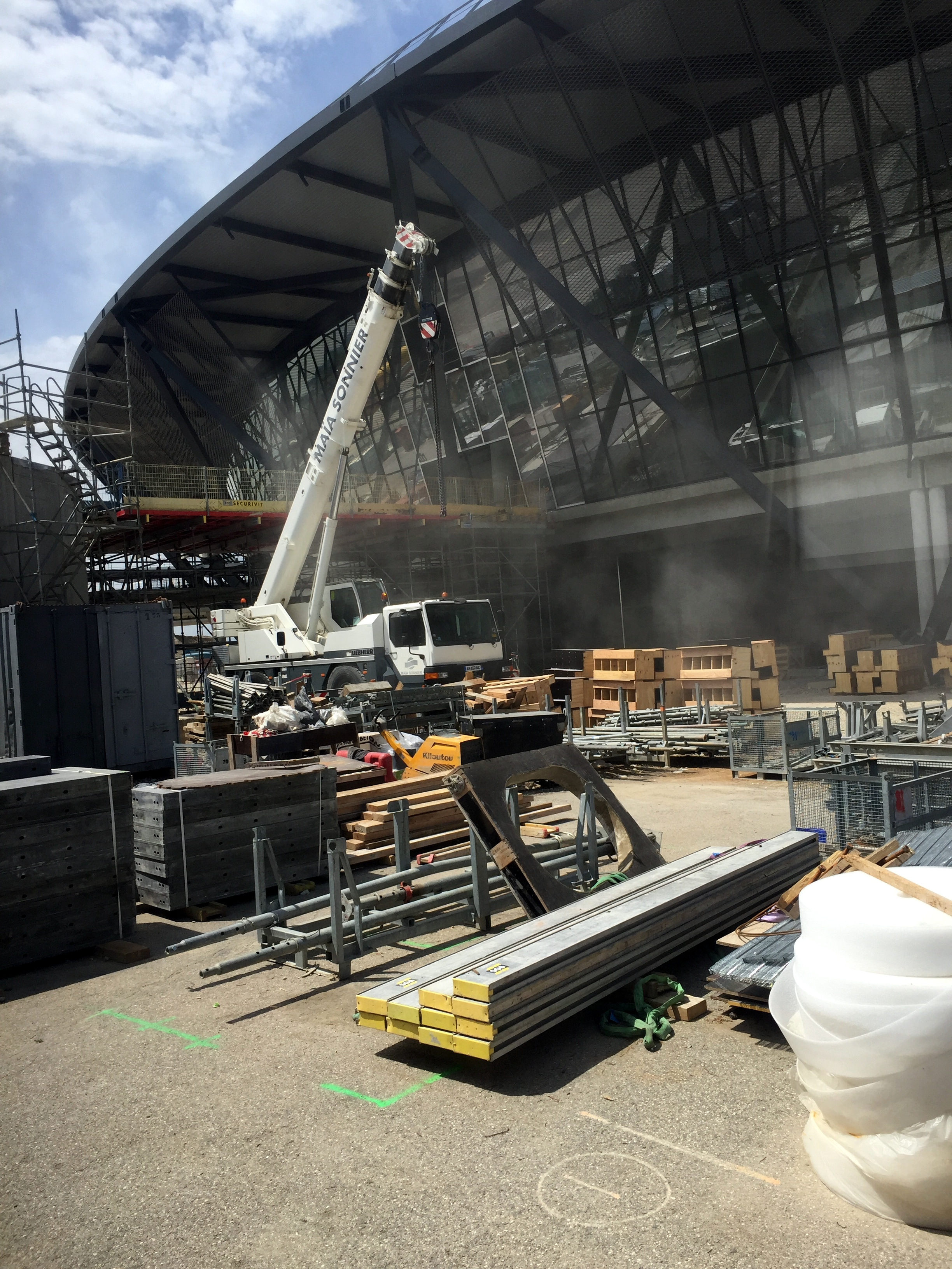 Aéroport de Lyon-St-Éxupéry en 2016.